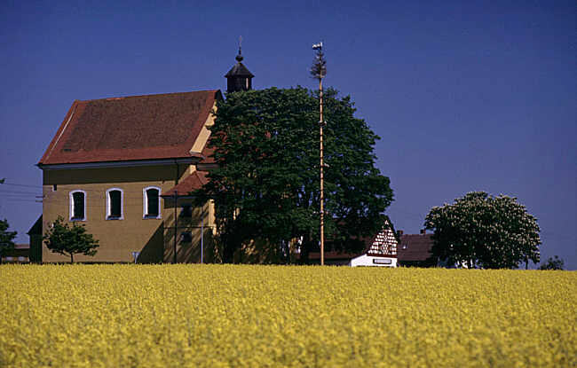 Kleine Kappl bei Ottengrün Copyright Status: GNU Freie Dokumentationslizenz